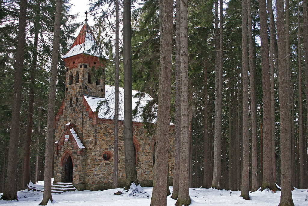 Głuchołazy Przednia Kopa - kaplica p.w. św. Anny, 1908